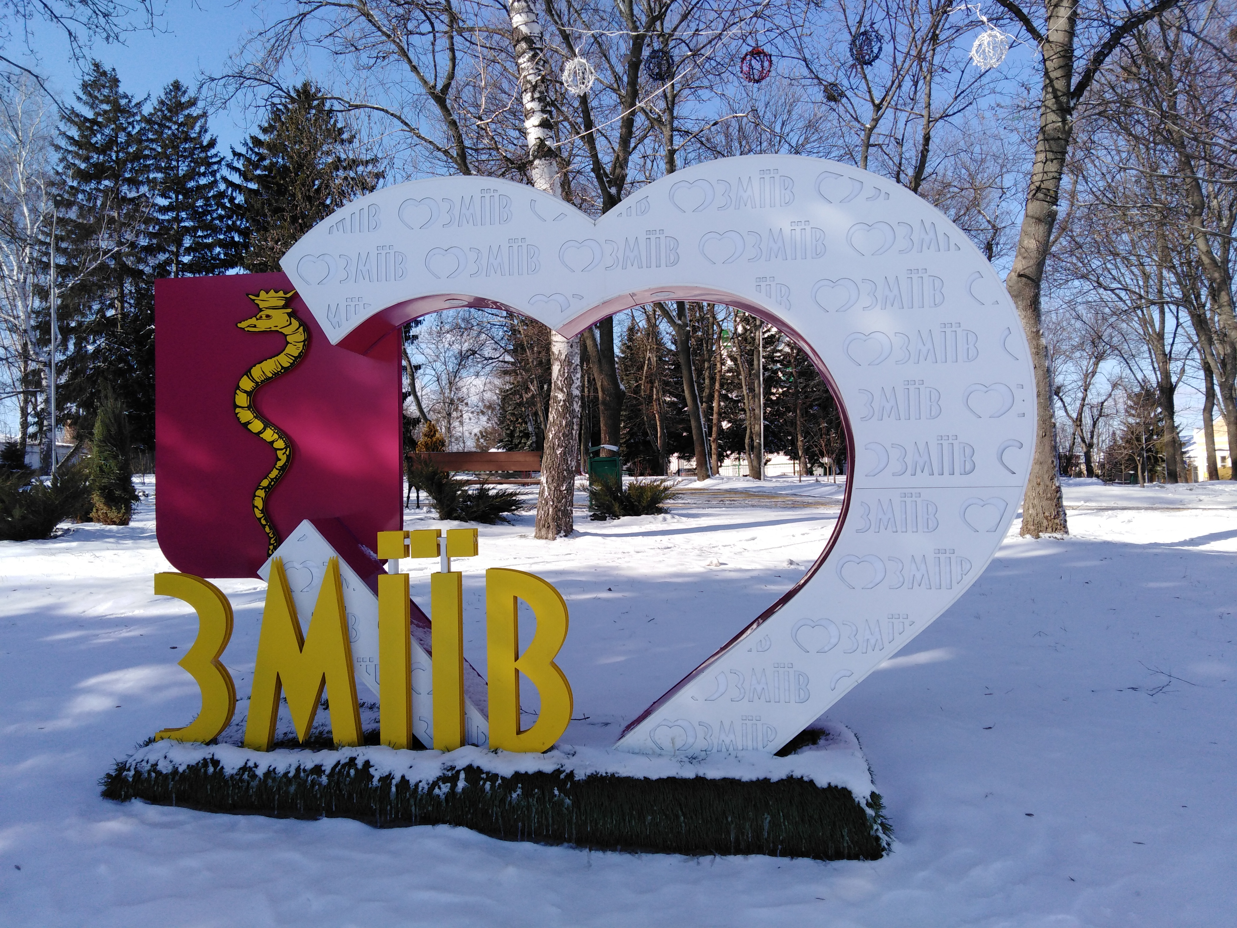 Інсталяція "Я люблю Зміїв" на Соборній площі у Змієві. Лютий 2020